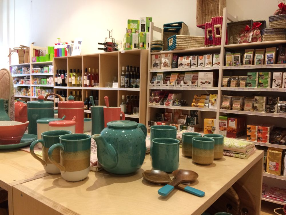 Magasin du monde-Oxfam à Ixelles, Belgique